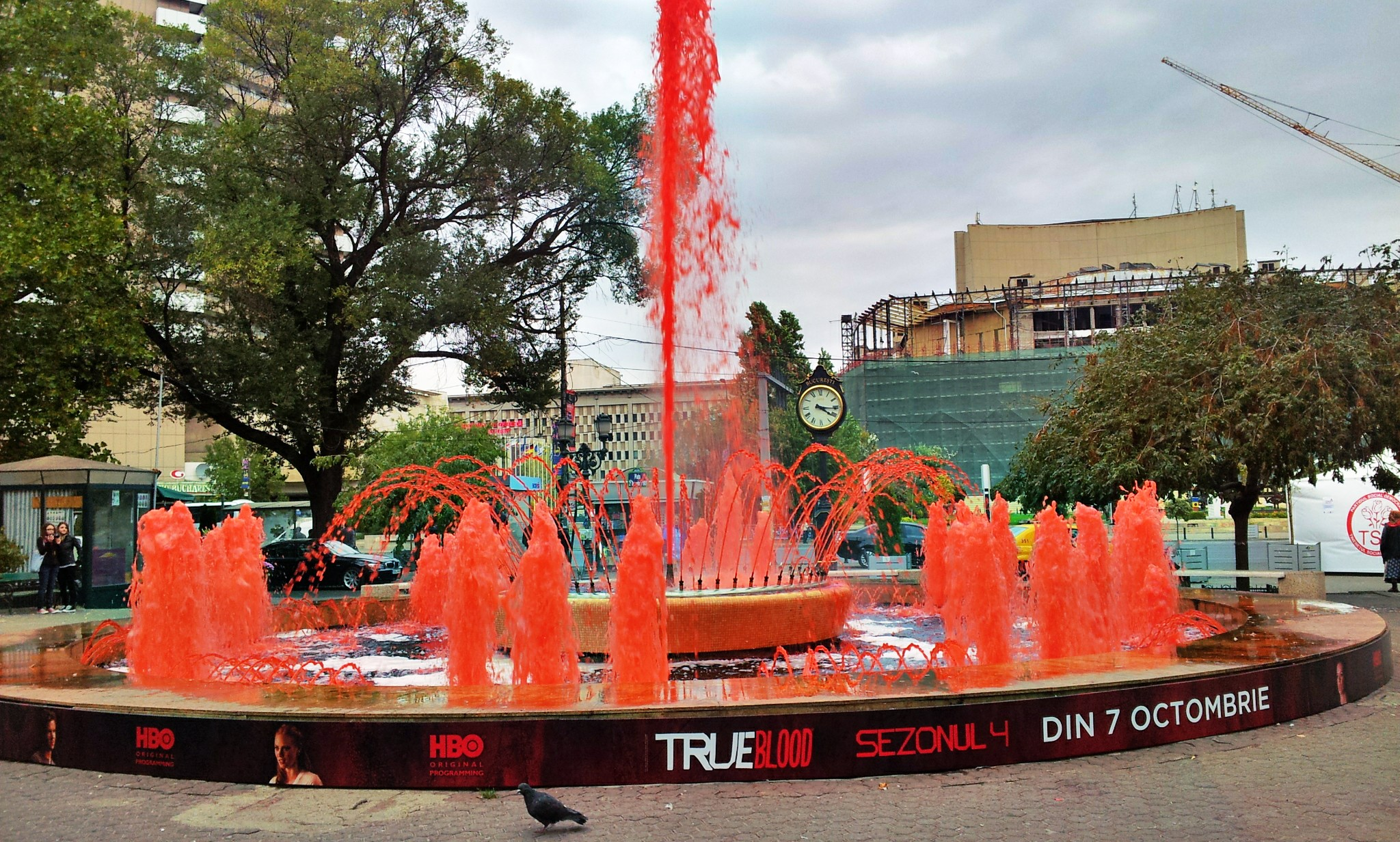 Universitatea București